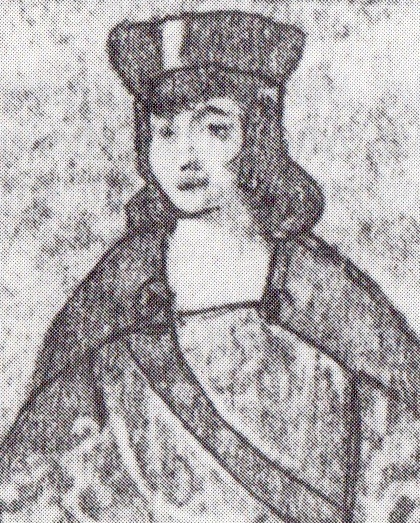 Otto der Hinkende, Herzog von Braunschweig-Lüneburg (gest.1446)